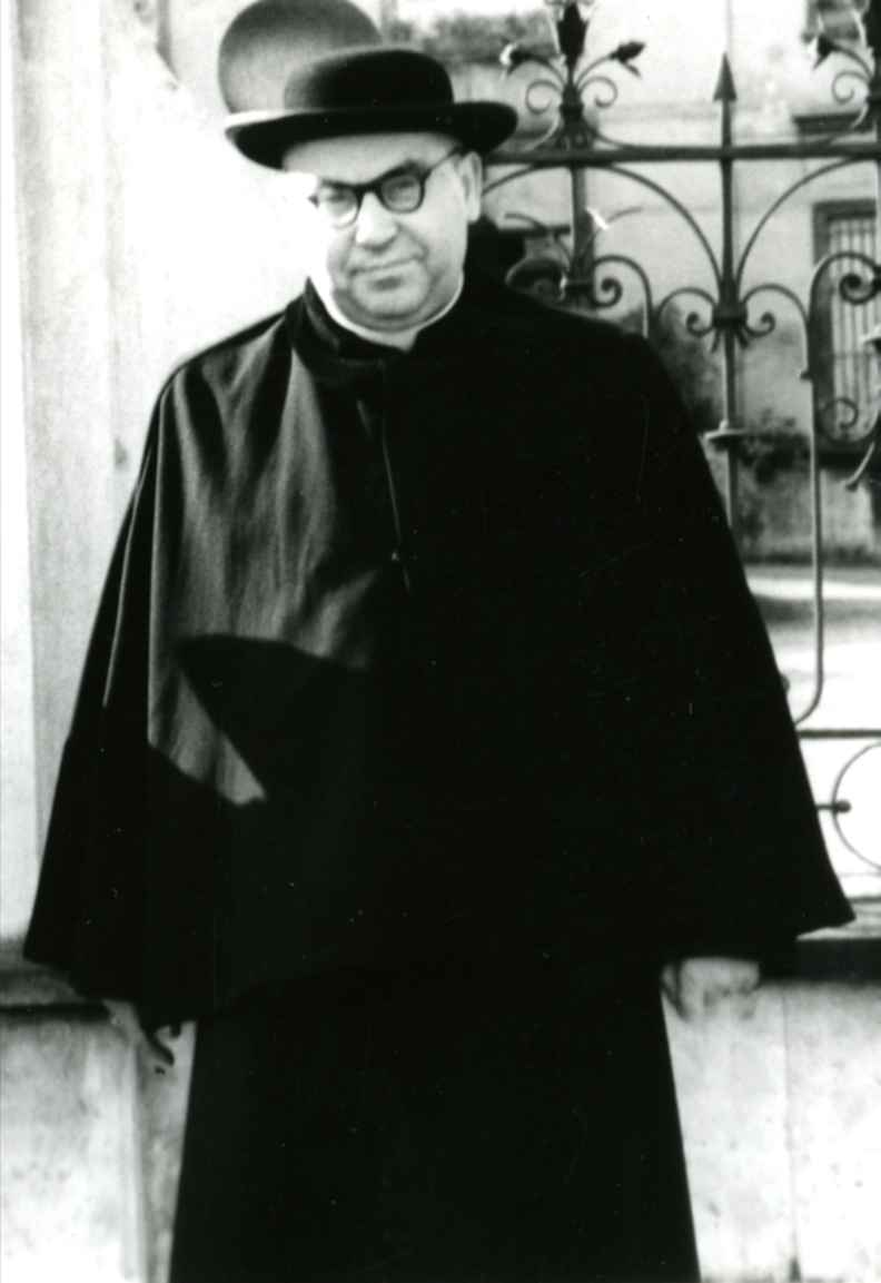 Arcybiskup wrocławski Bolesław Kominek